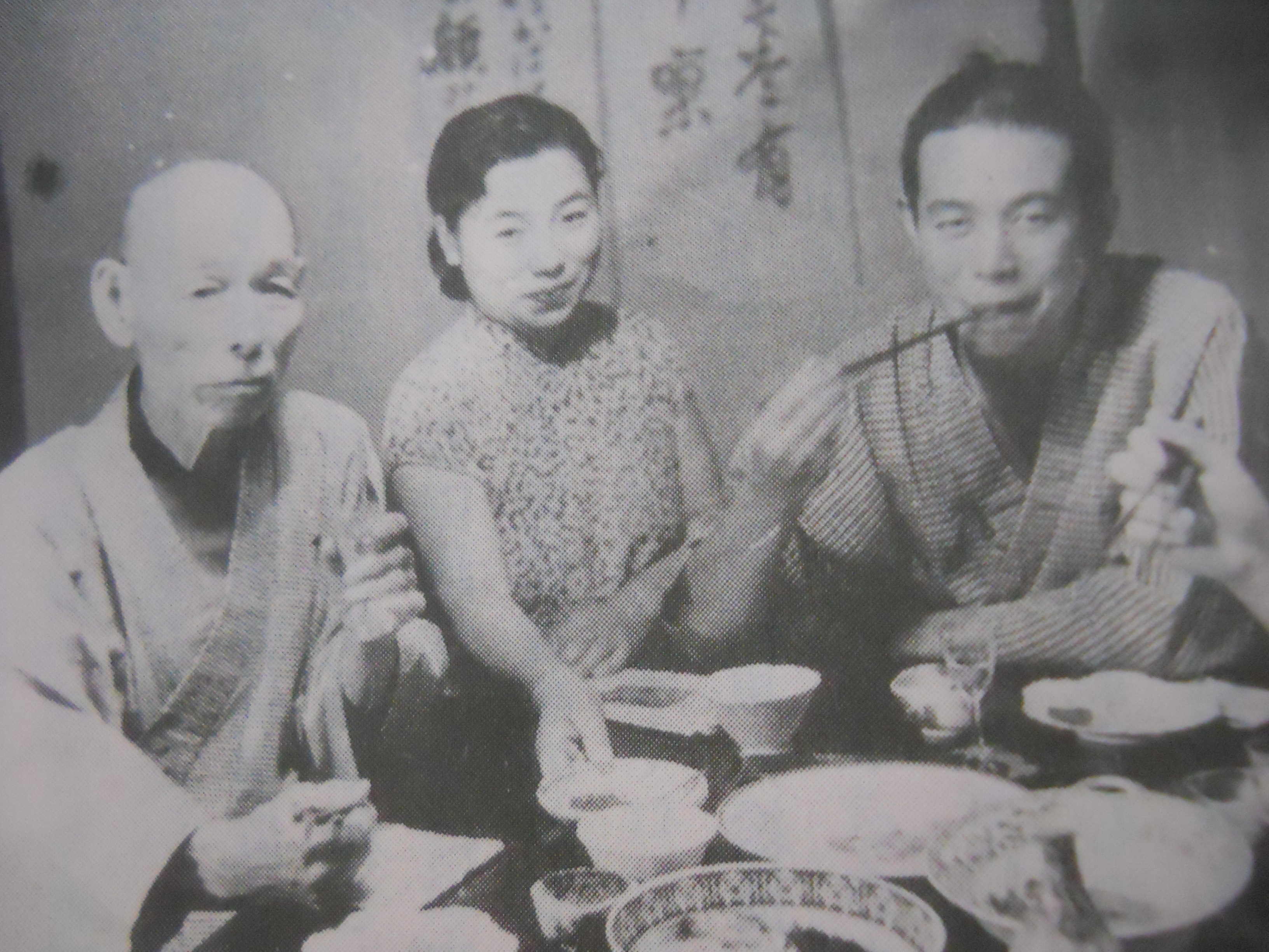 Agawa Family